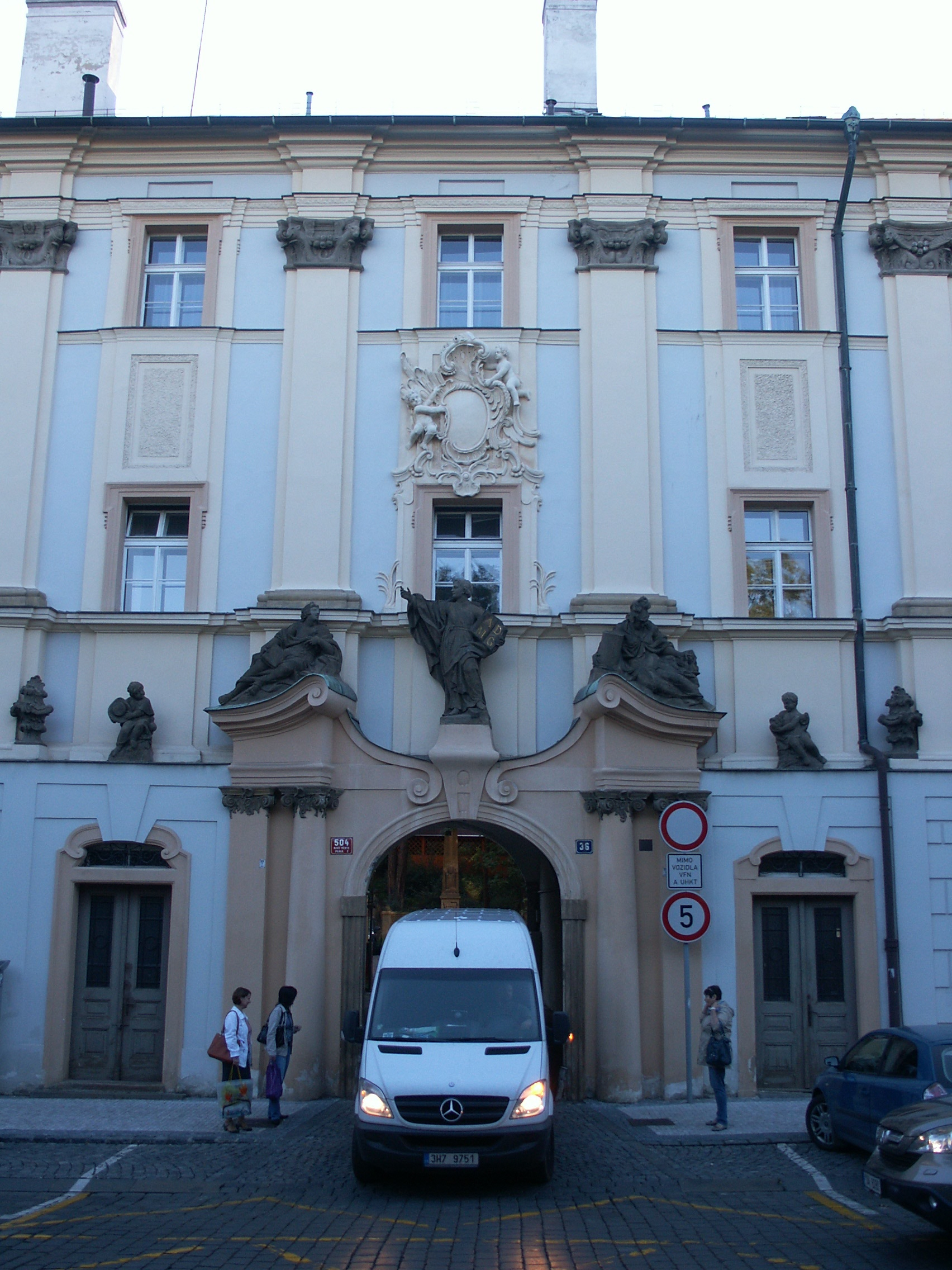 Kolej Jezuitská Novoměstská (Nové Město), Praha 2, Karlovo nám., U Nemocnice 504, Nové Město - střední portál